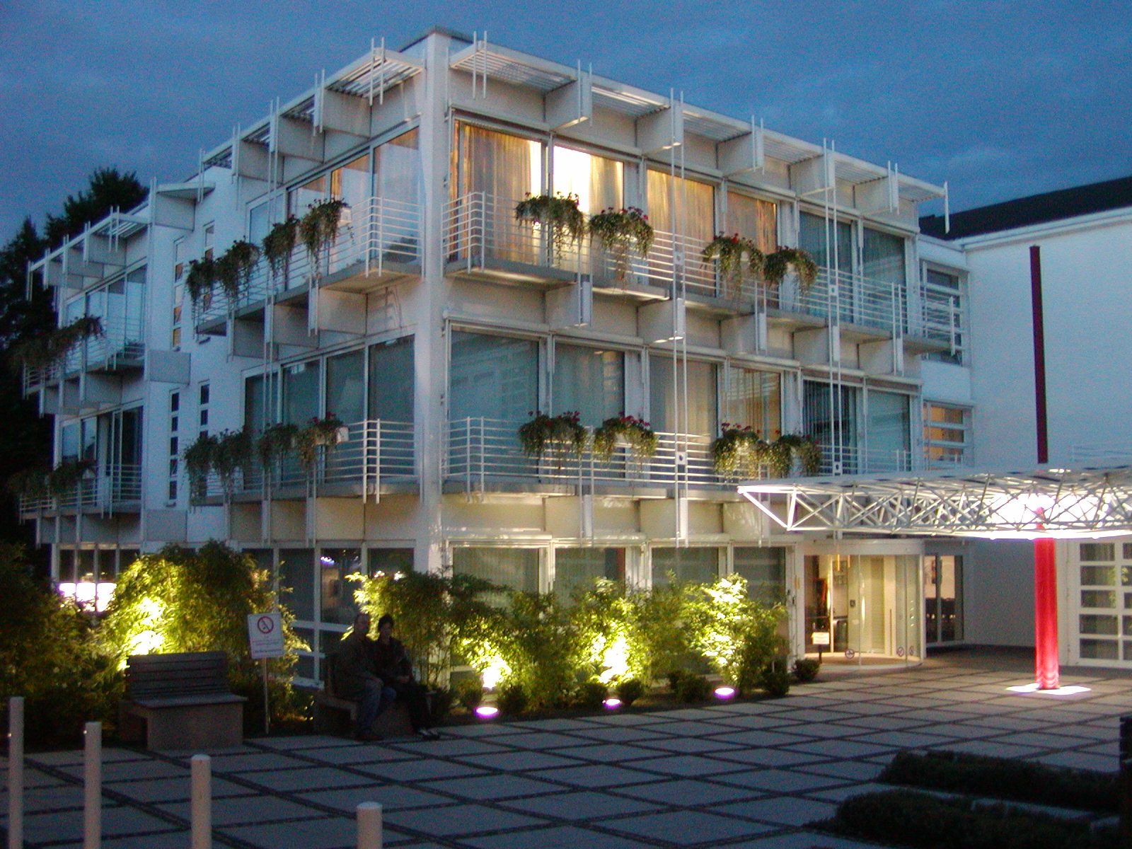 Gollwitzer-Meier-Institut Bad Oeynhausen